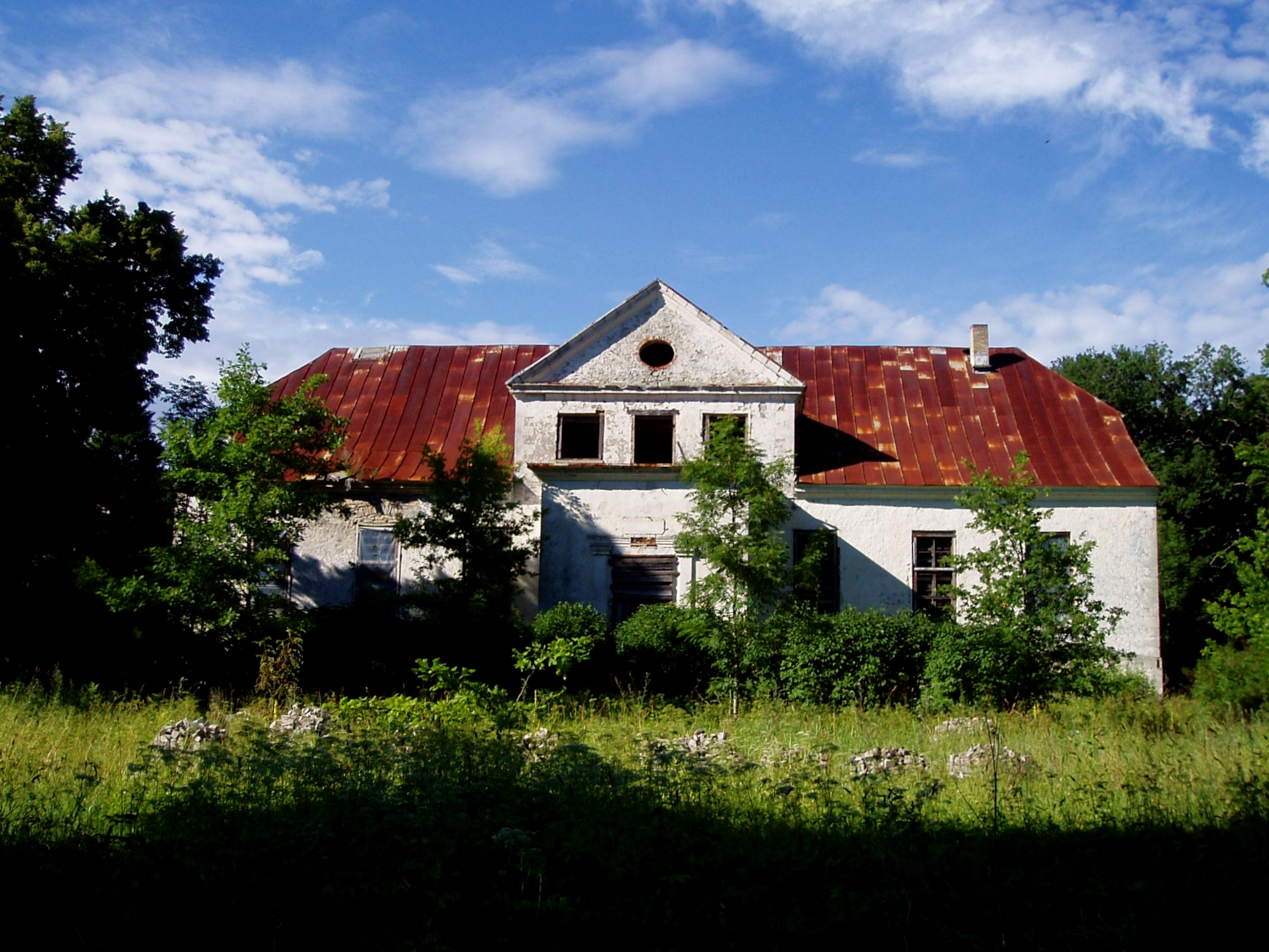 Audla mõisa peahoone